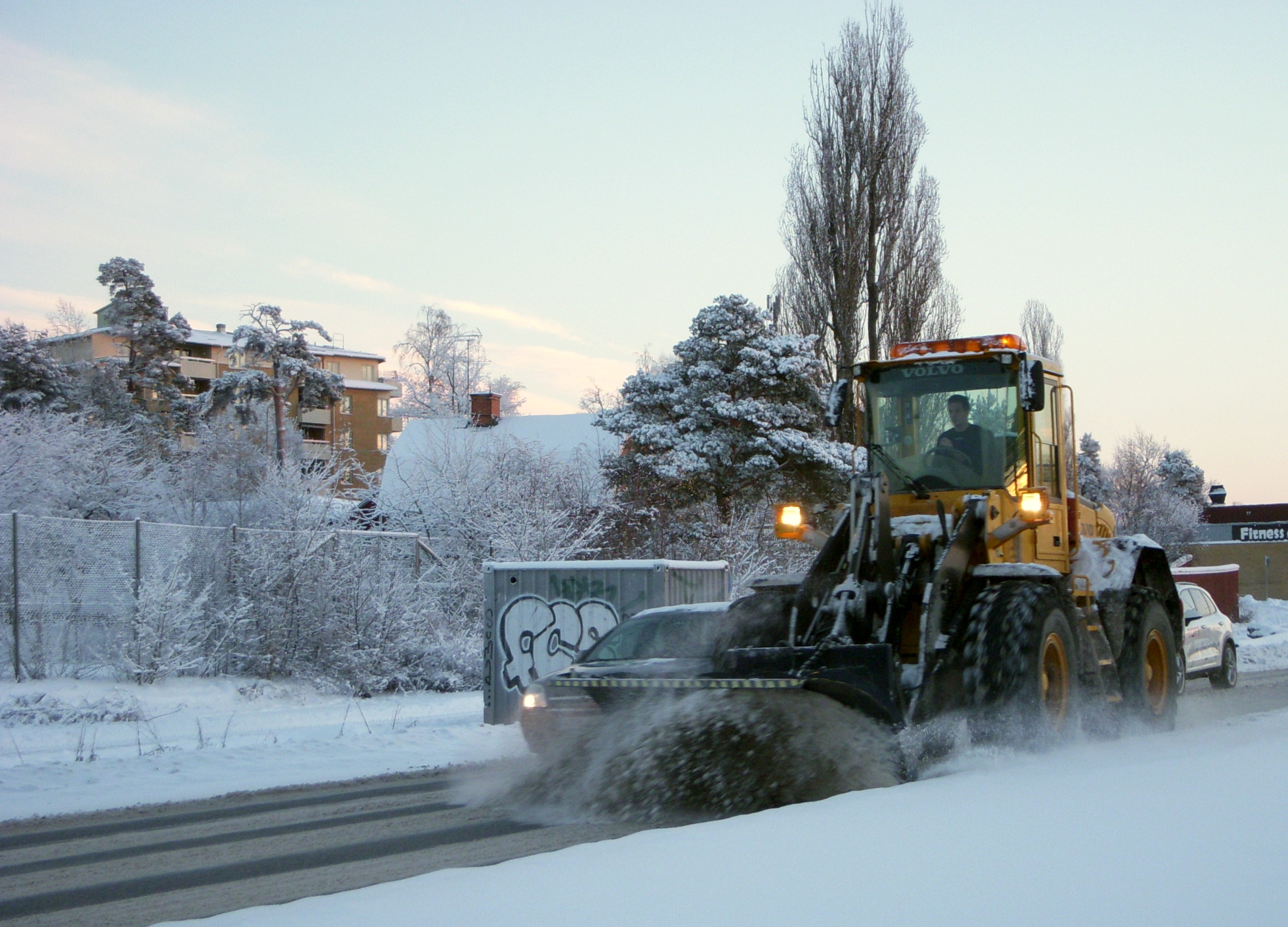 Snöplogning på Häradsvägen i Huddinge